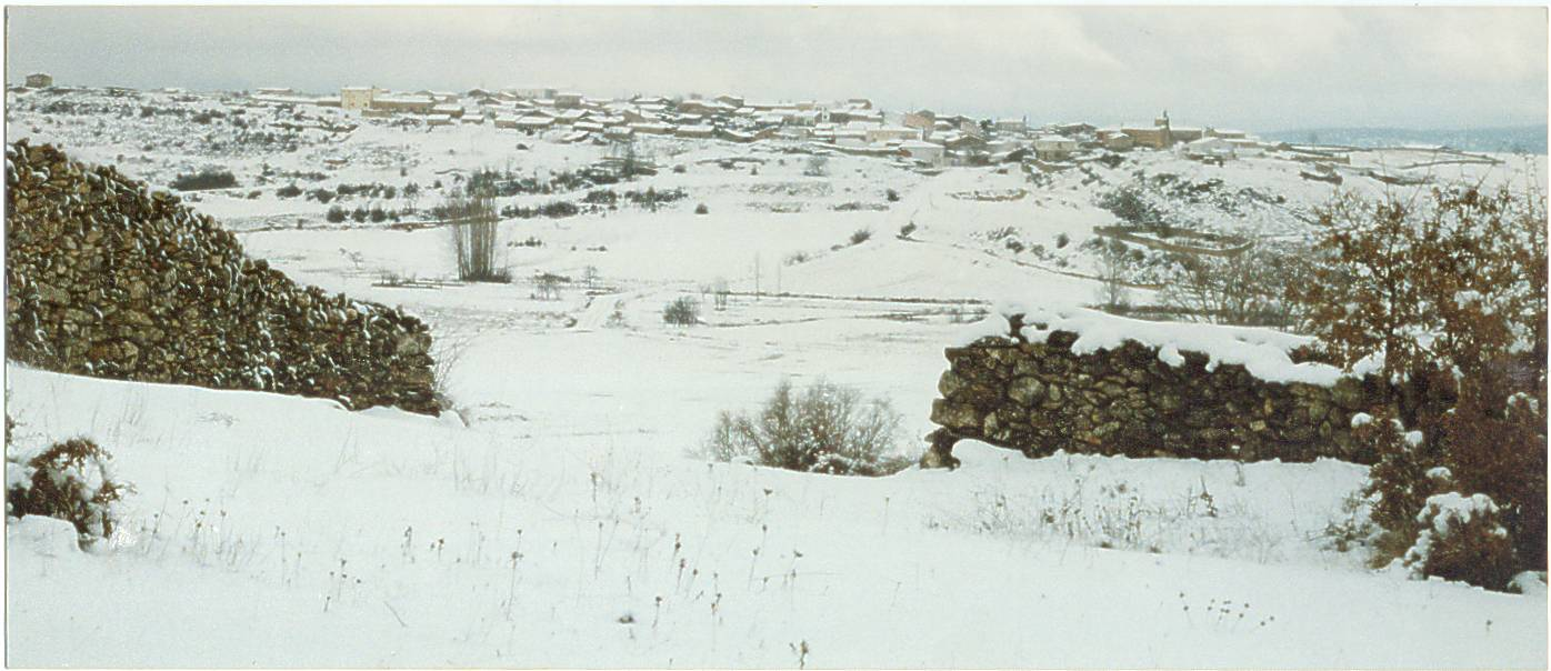 Vista invernal, desde la Cañada.